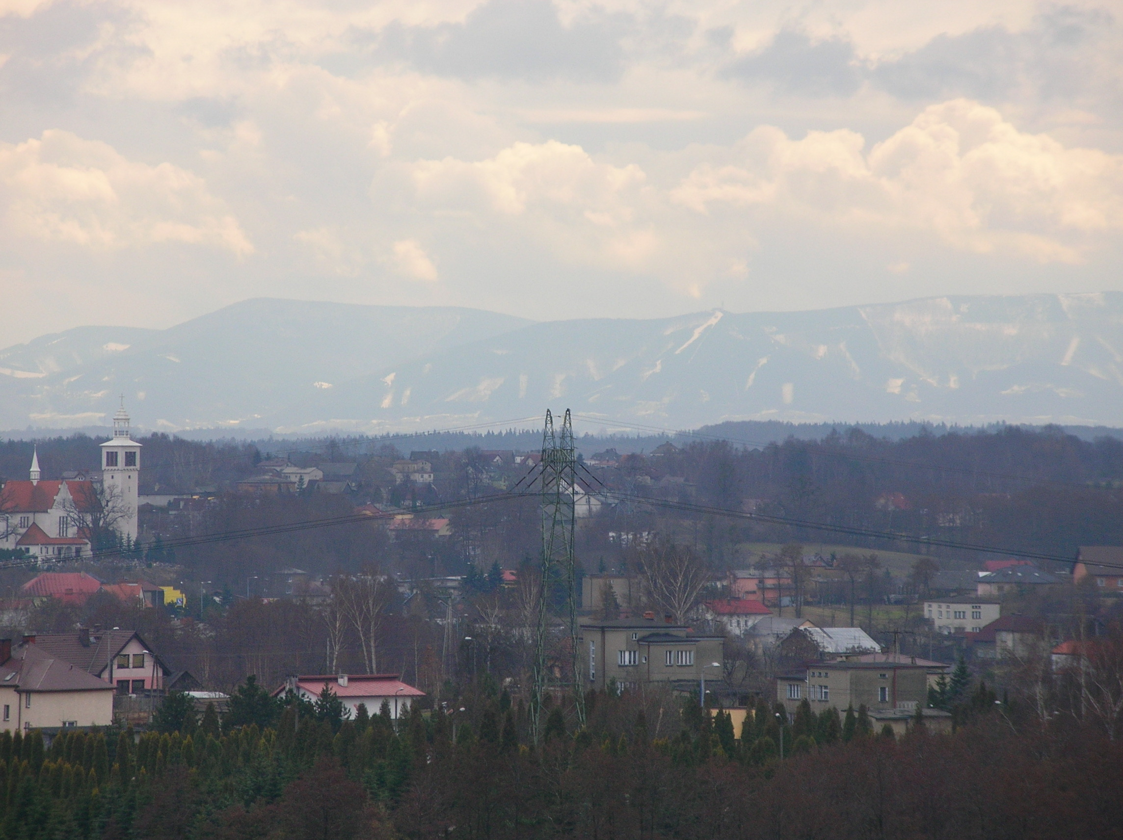 Ruptawa - w tle Beskid Śląski